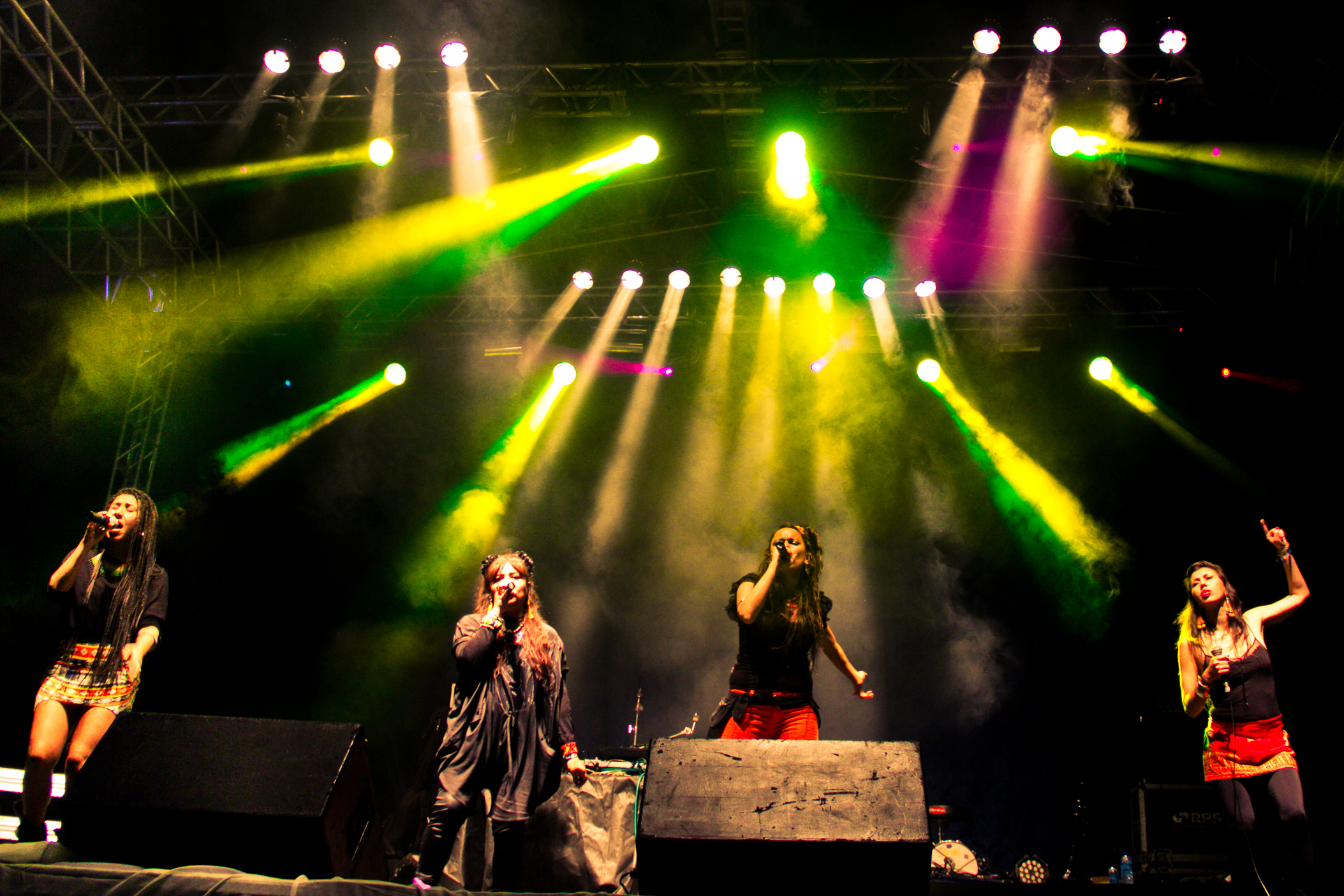 Actitud María Marta es un grupo de hip hop argentino con influencias culturales y musicales latinoamericanas y jamaiquinas, que suele combinar esta fusión sonora con una mirada crítica del mundo y la realidad